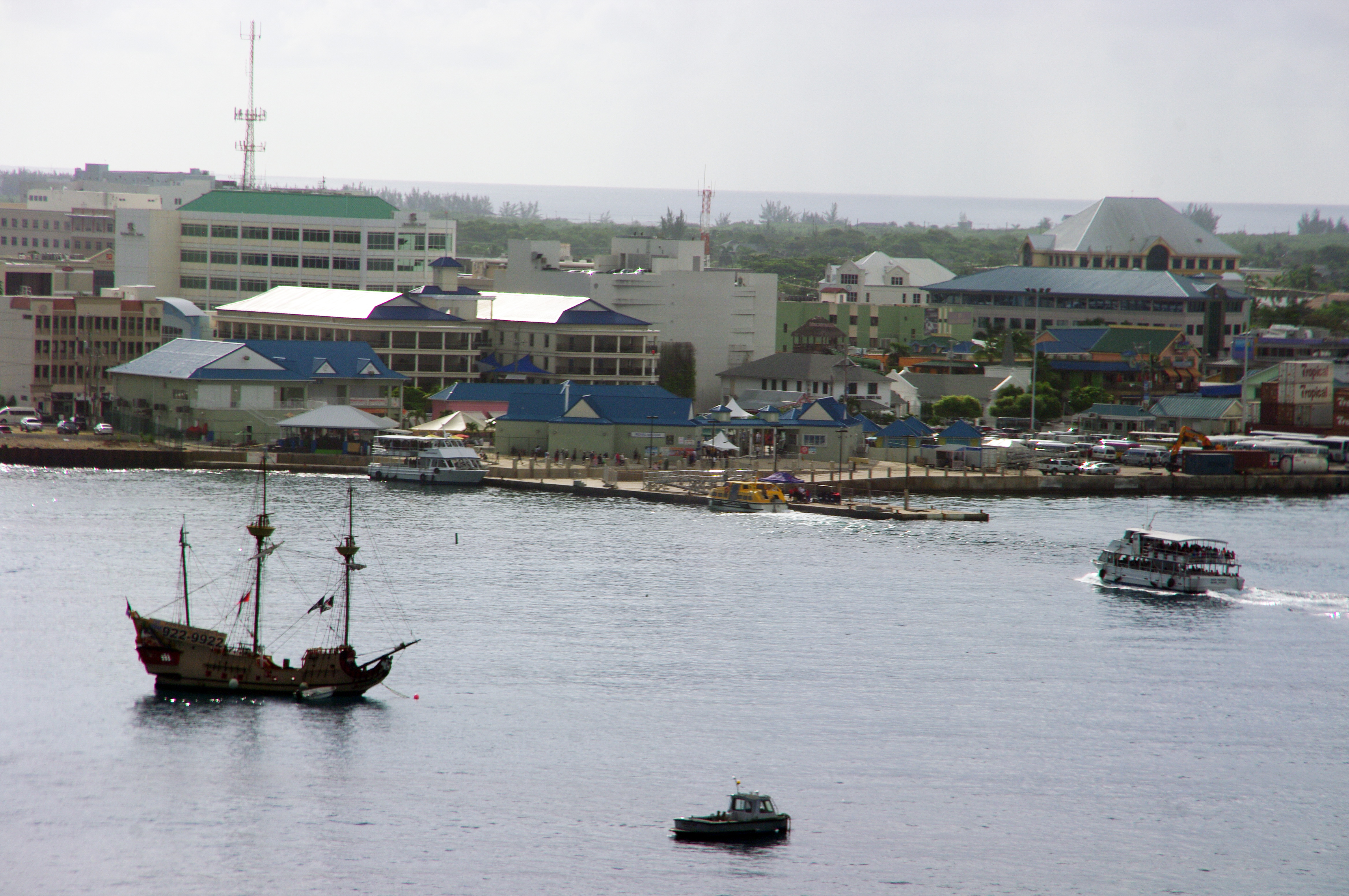 Blick von einem Kreuzfahrtschiff zum Hafen von George Town